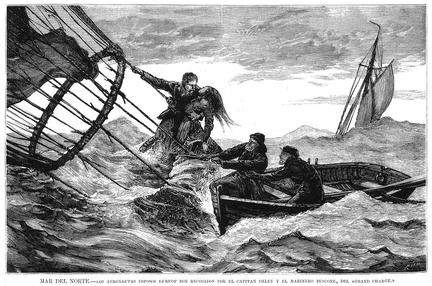 Mar del Norte, los aeronautas esposos Duruof son recogidos por el capitán Oxley y el marinero Buscone, del «Grand Charge», en la revista española La Ilustración Española y Americana.